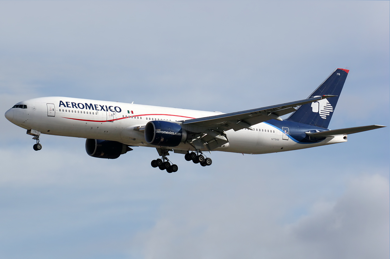 Madrid - Barajas (LEMD/MAD)